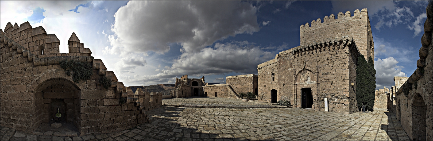 Spain, Almeria, Alcazaba